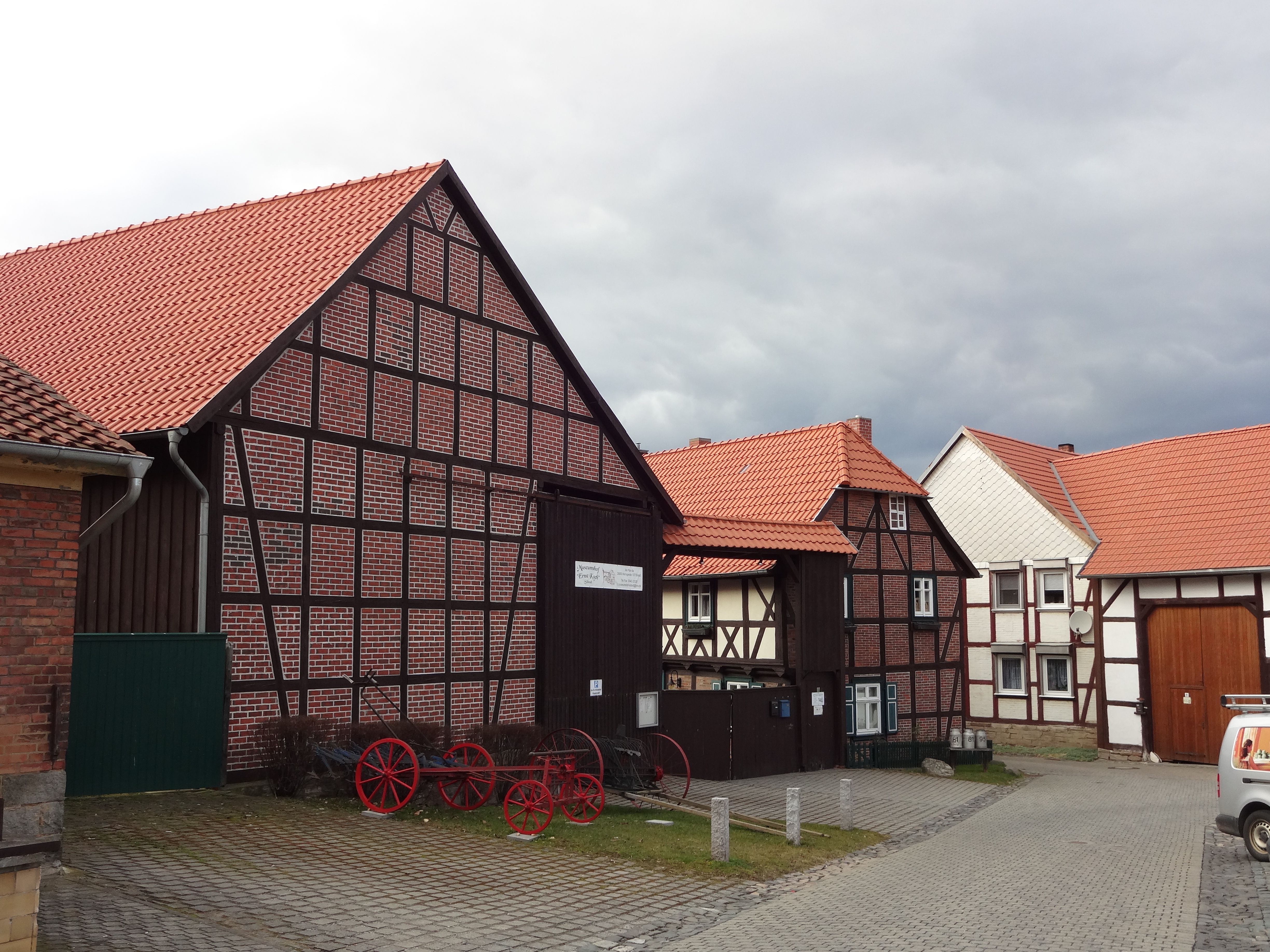 denkmalgeschütztes Bauerngehöft Am Plan 4a in Silstedt, Ortsteil von Wernigerode